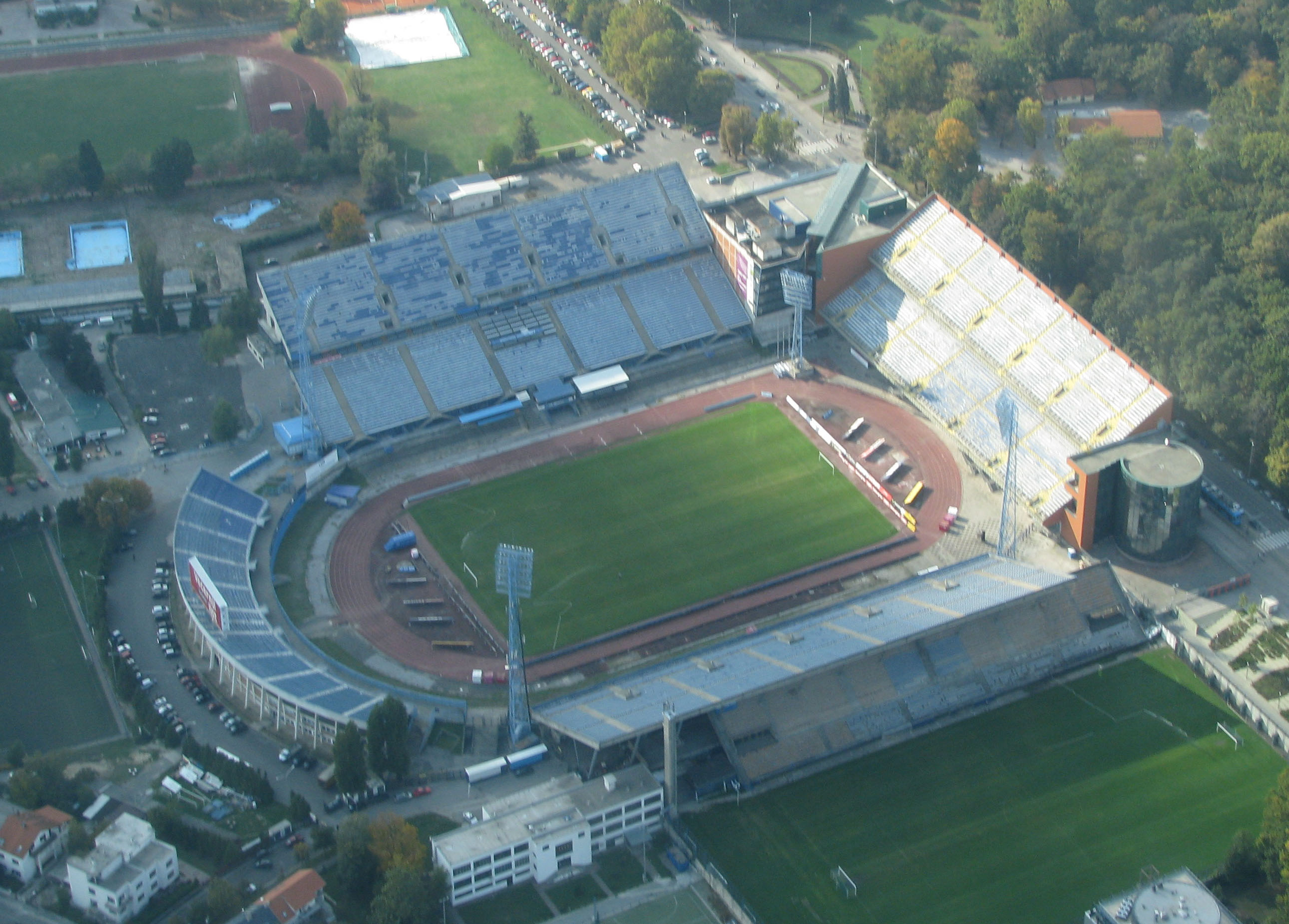 Maksimirski stadion Zagreb